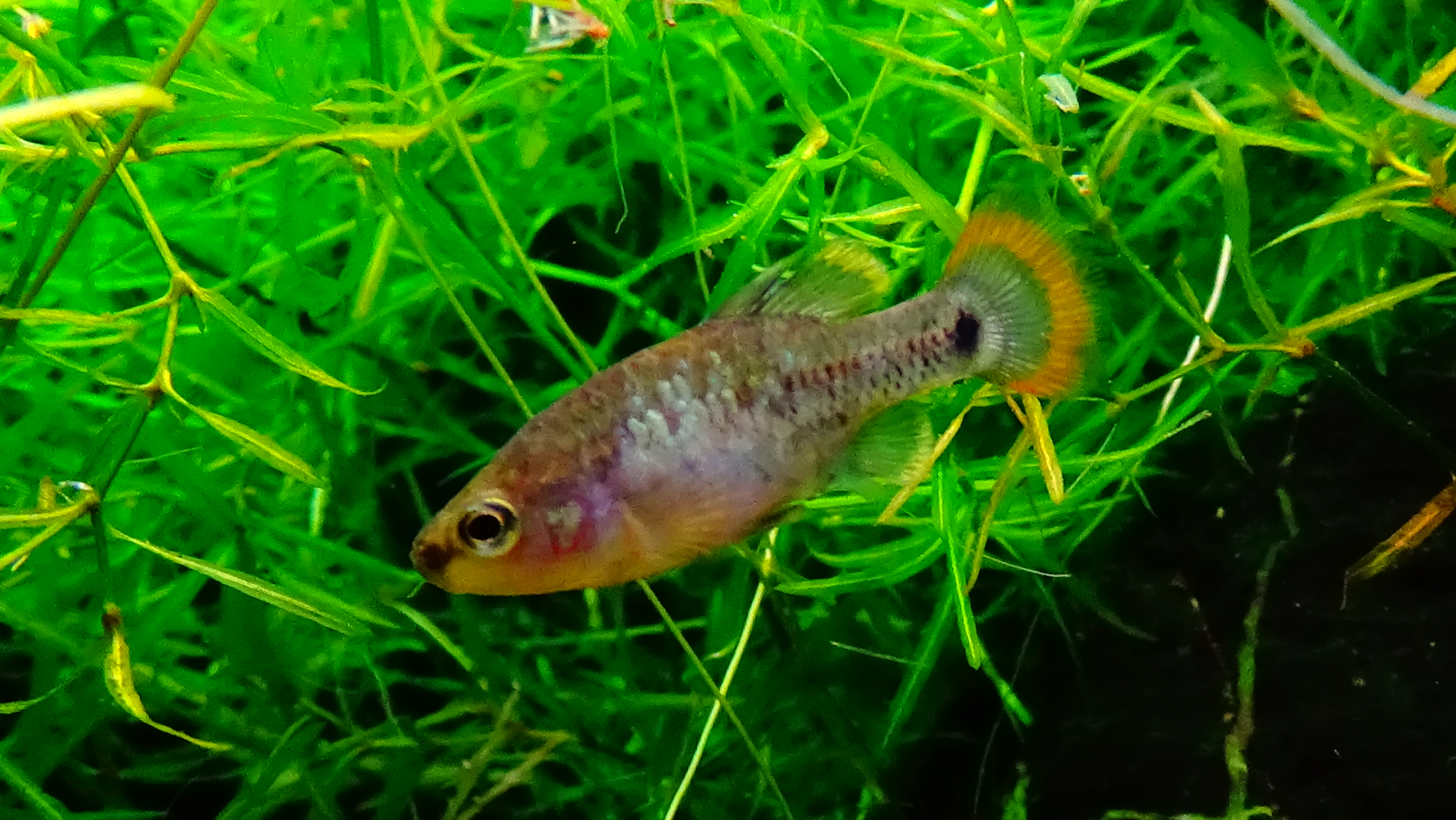 Zoogoneticus tequila - Aquarium Tropical du Palais de la Porte Dorée - Paris/France - 29/04/2015